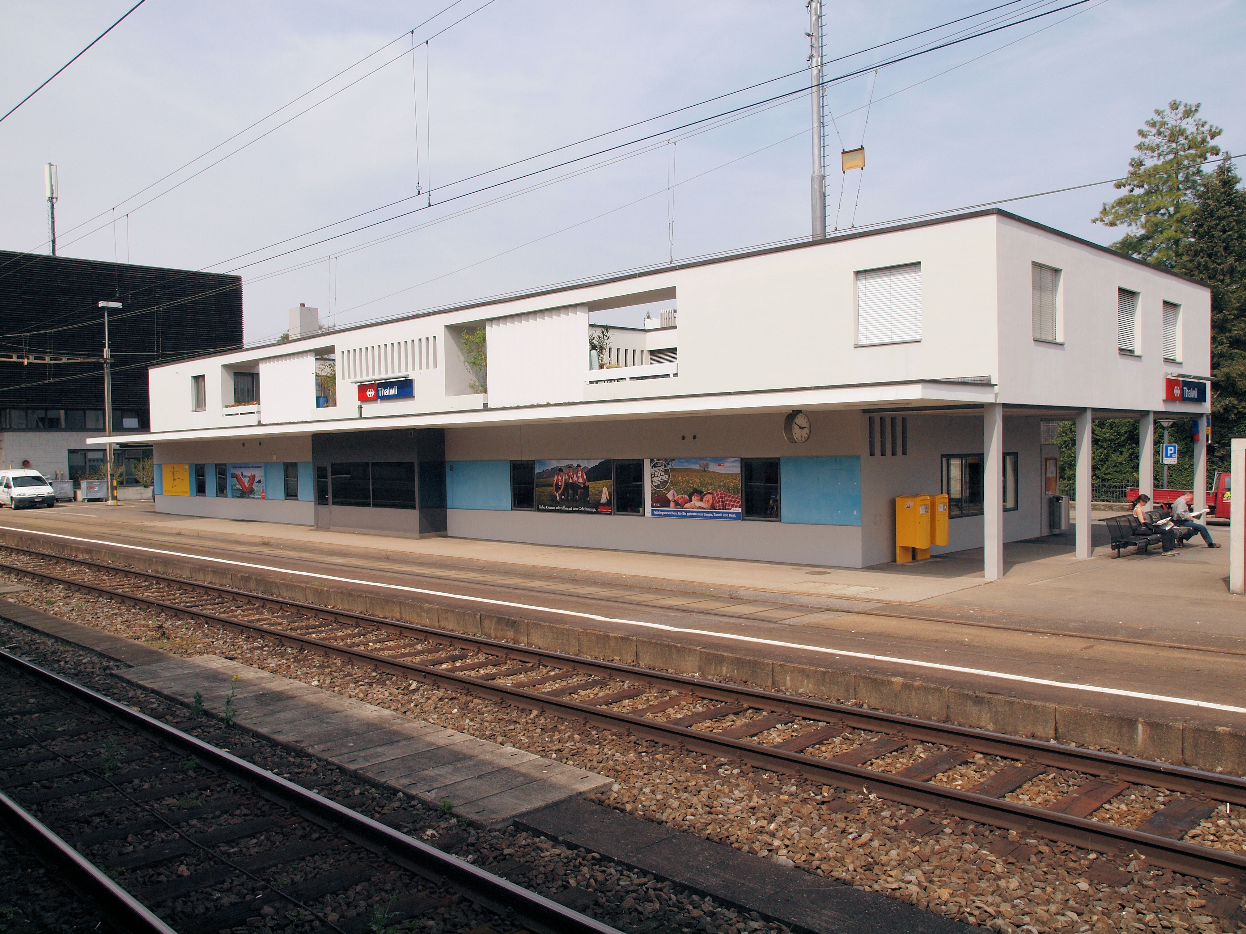 Das Aufnahmegebäude des Bahnhof Thalwil. Erbaute 1963, Architekt Max Vogt.